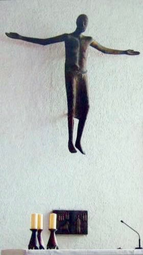 Die Christusfigur und der Tabernakel aus Bronze und wurden von Erich Stadler gefertigt und hängen in der Nonnnehorner Pfarrkirche St. Christophorus